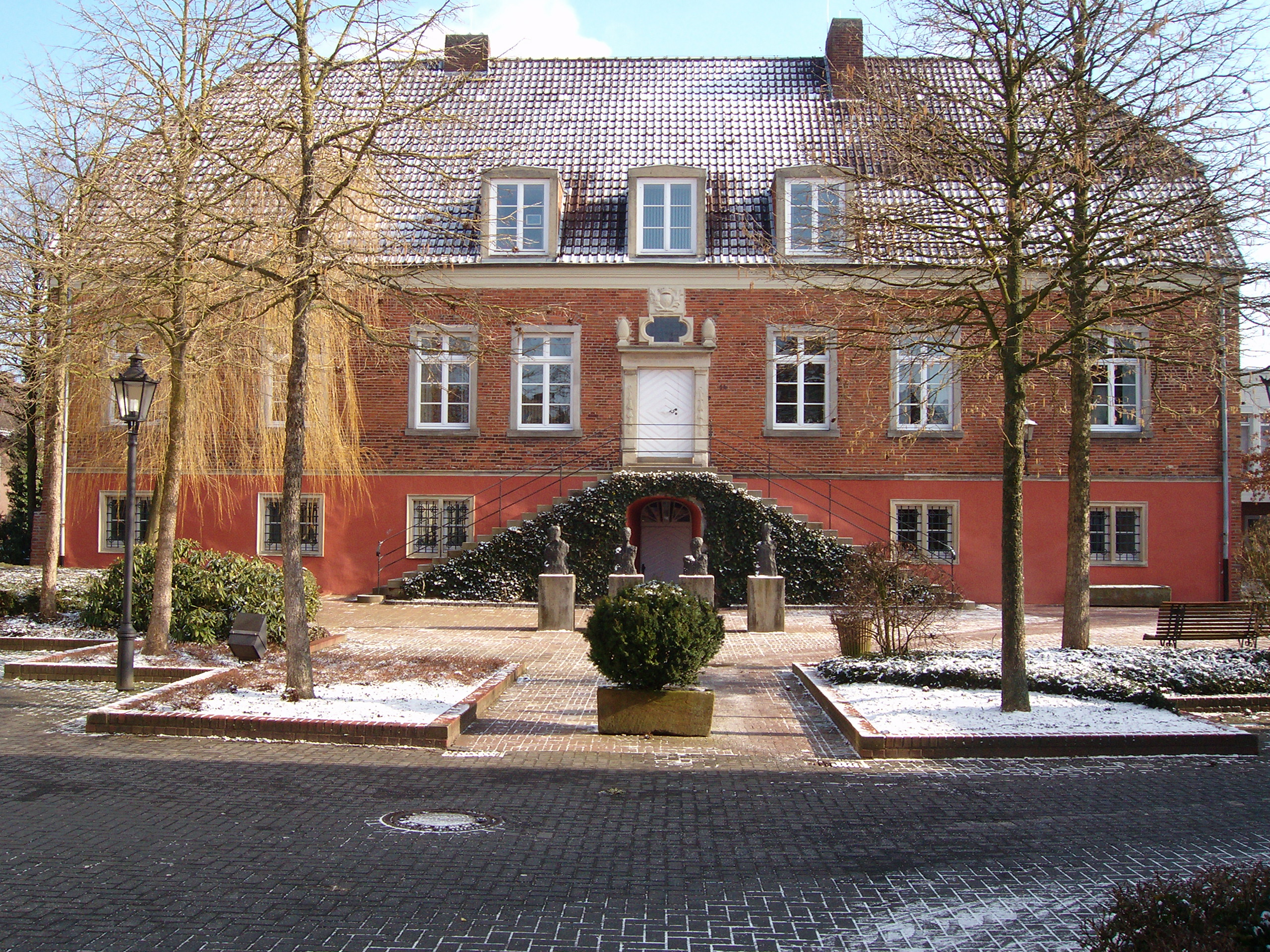 Vreden, ehemalige fürstbischöfliche Burg (am 12.03.2006)